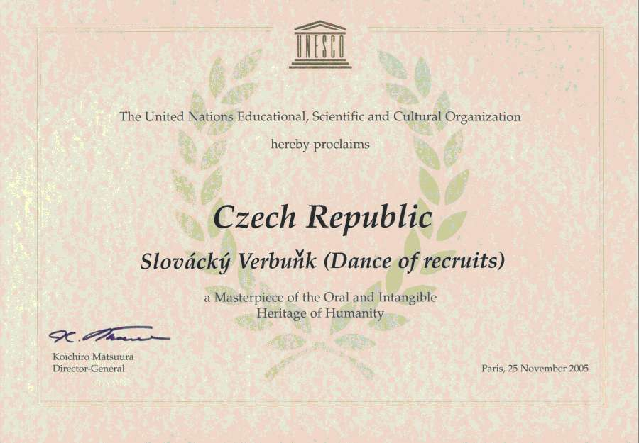 Oficiální diplom potvrzující prohlášení verbuňku Mistrovským dílem ústního a nemateriálního dědictví lidstva